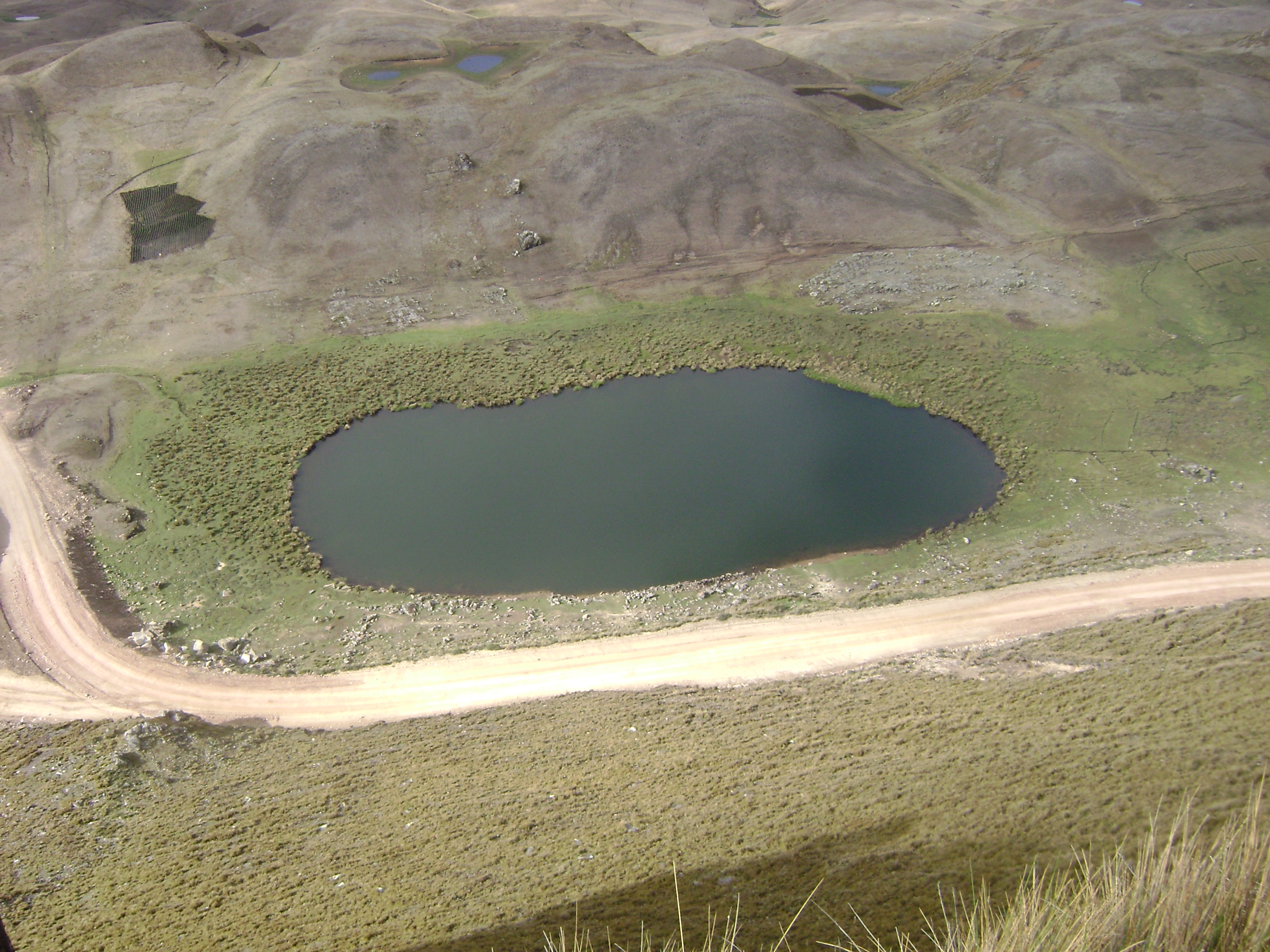 Aymar aru: Aka Qachu Qutax wali yanqhaniwa.